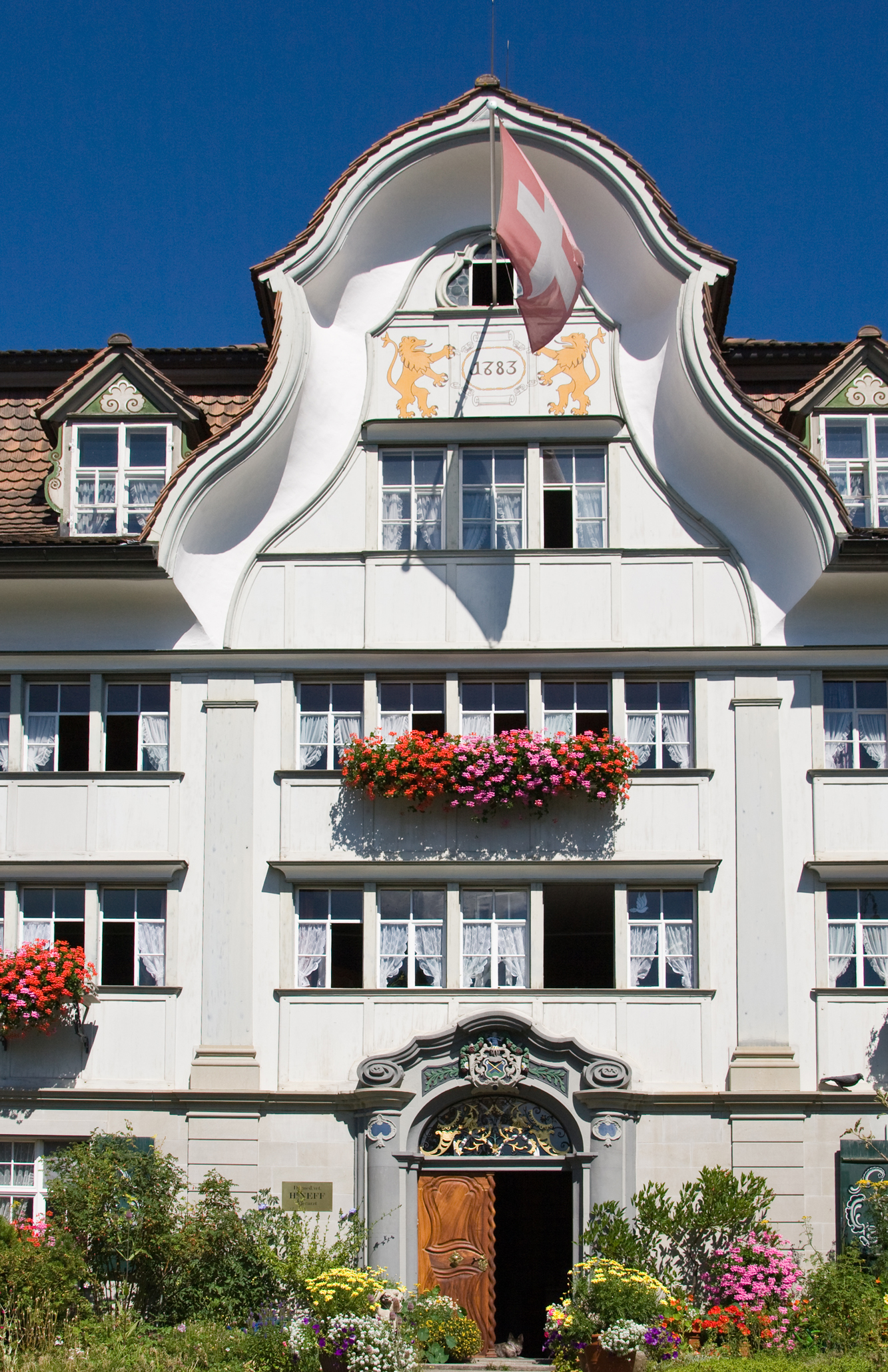 Ehemaliges Kaufmannshaus Gruber aus dem Jahre 1783 in Gais